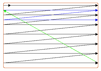 Illustration des Bildaufbaus beim Fernsehen